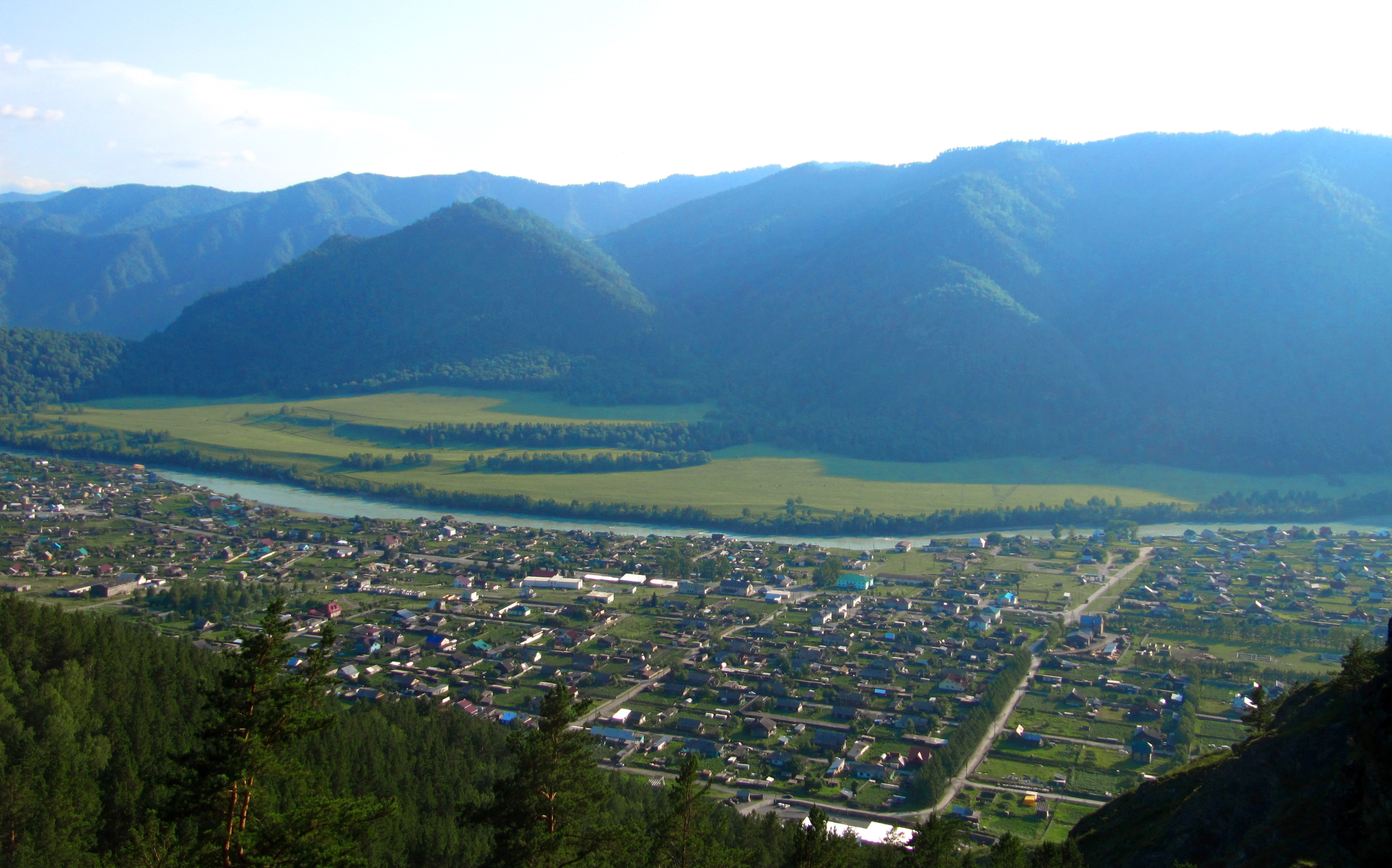 Вид на Чемал с горы